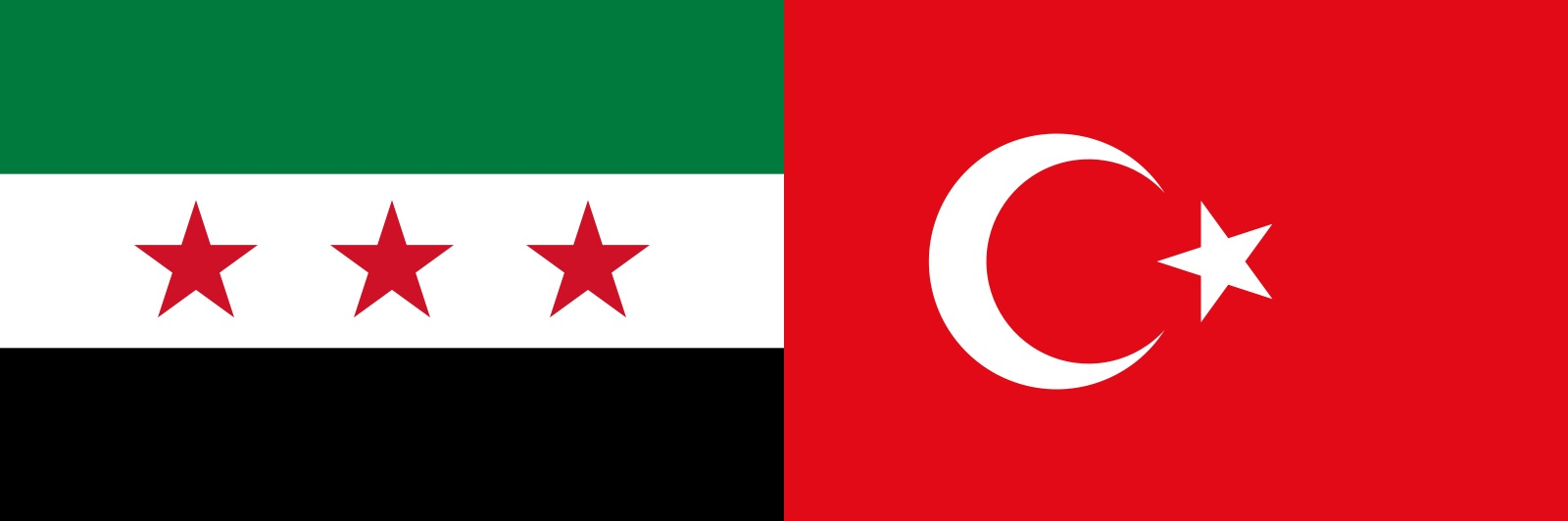 Türkiye destekli Özgür Suriye Ordusu ve Türkiye bayrağı.